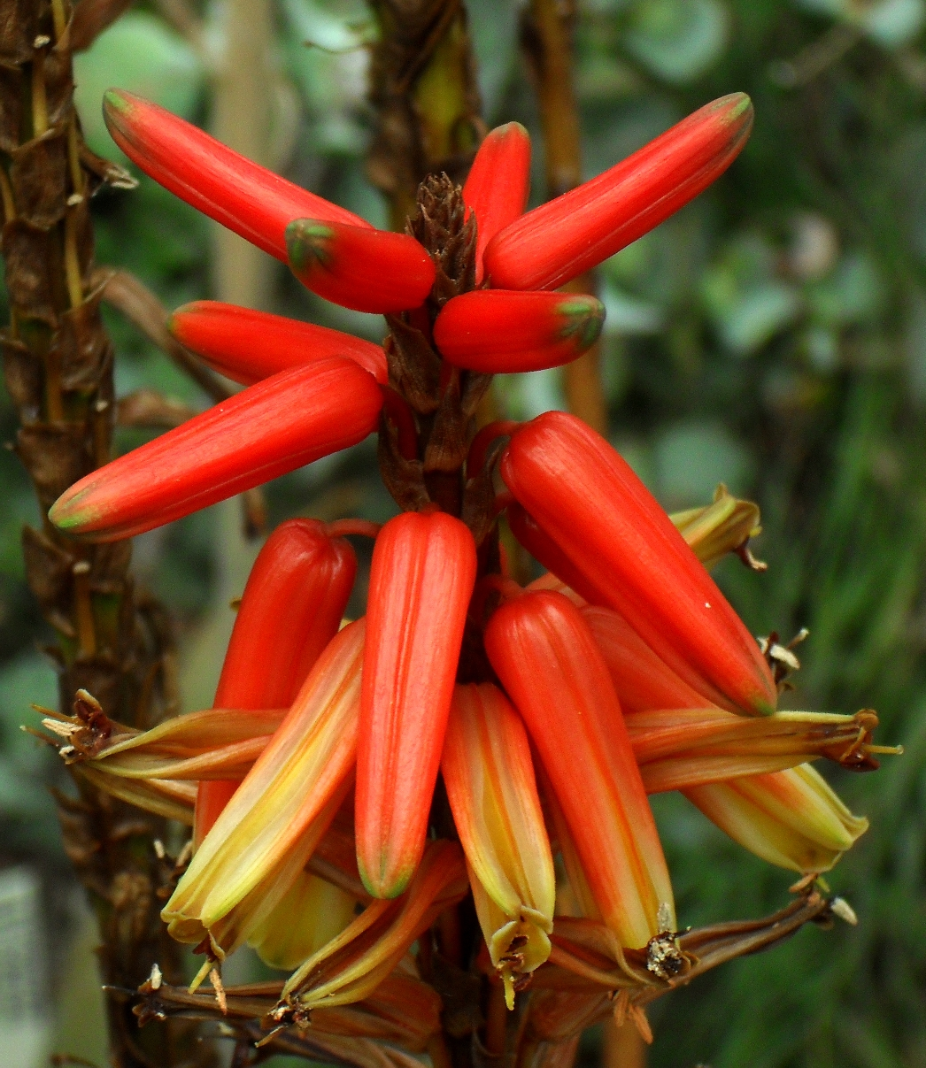 Aloe cryptopoda - Botanischer Garten Leipzig